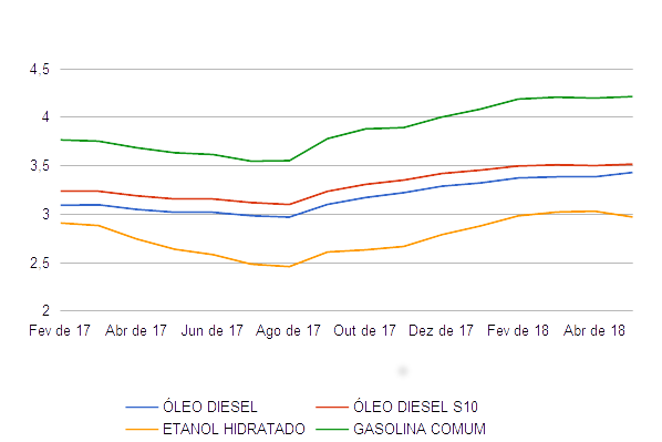 Evolução do preço dos combustíveis no Brasil entre janeiro de 2017 e abril de 2018, fonte ANP